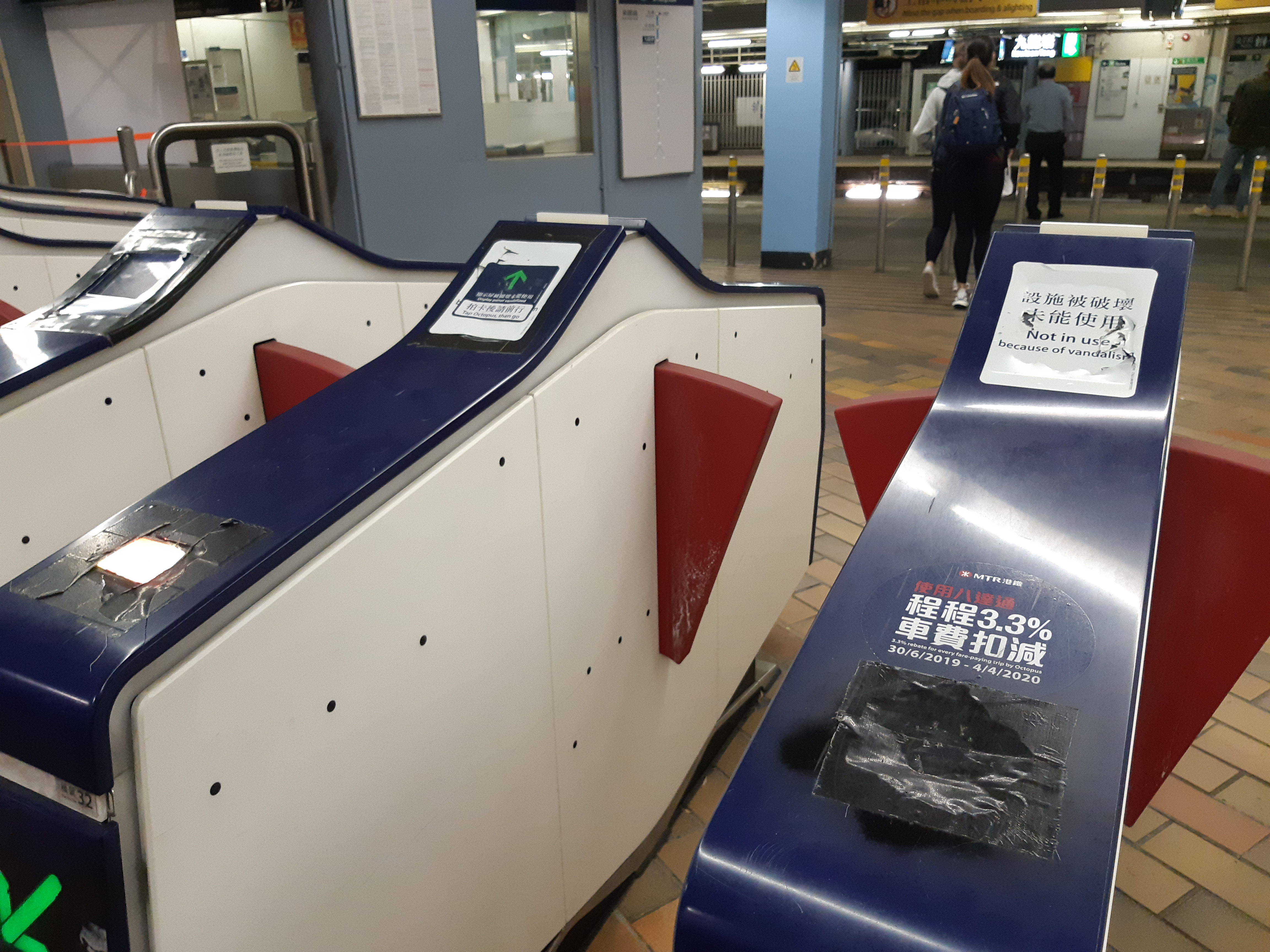 中文（香港）: 港鐵九龍塘站因損毀而暫停使用的閘機